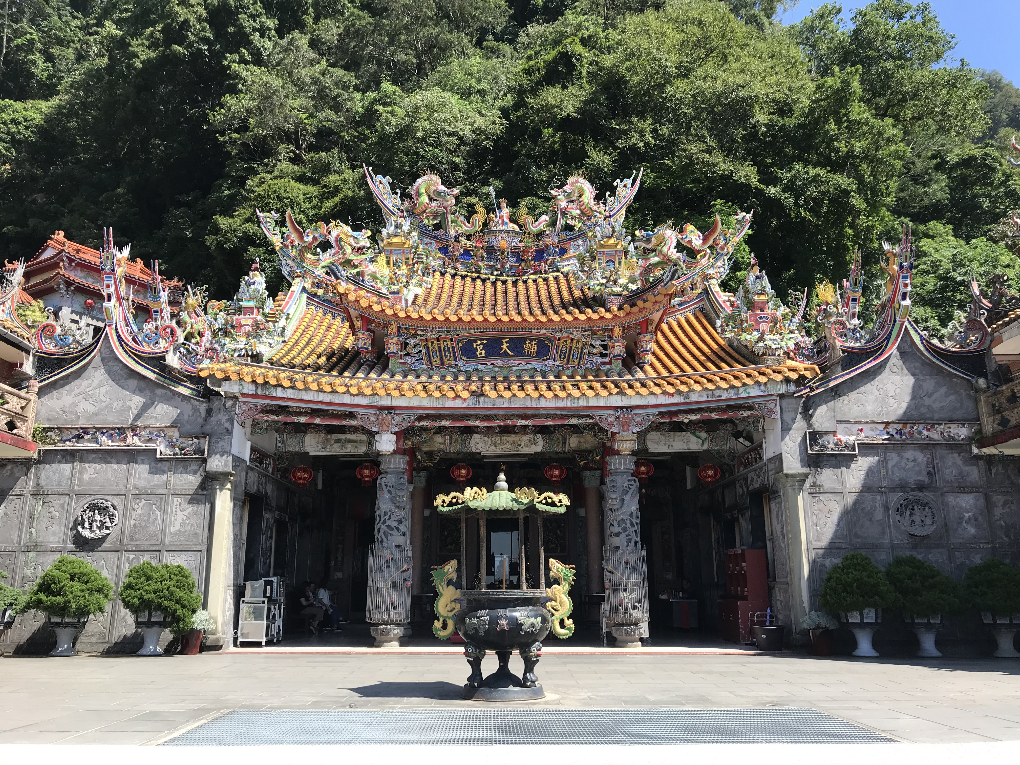 中文（台灣）: 獅頭山輔天宮